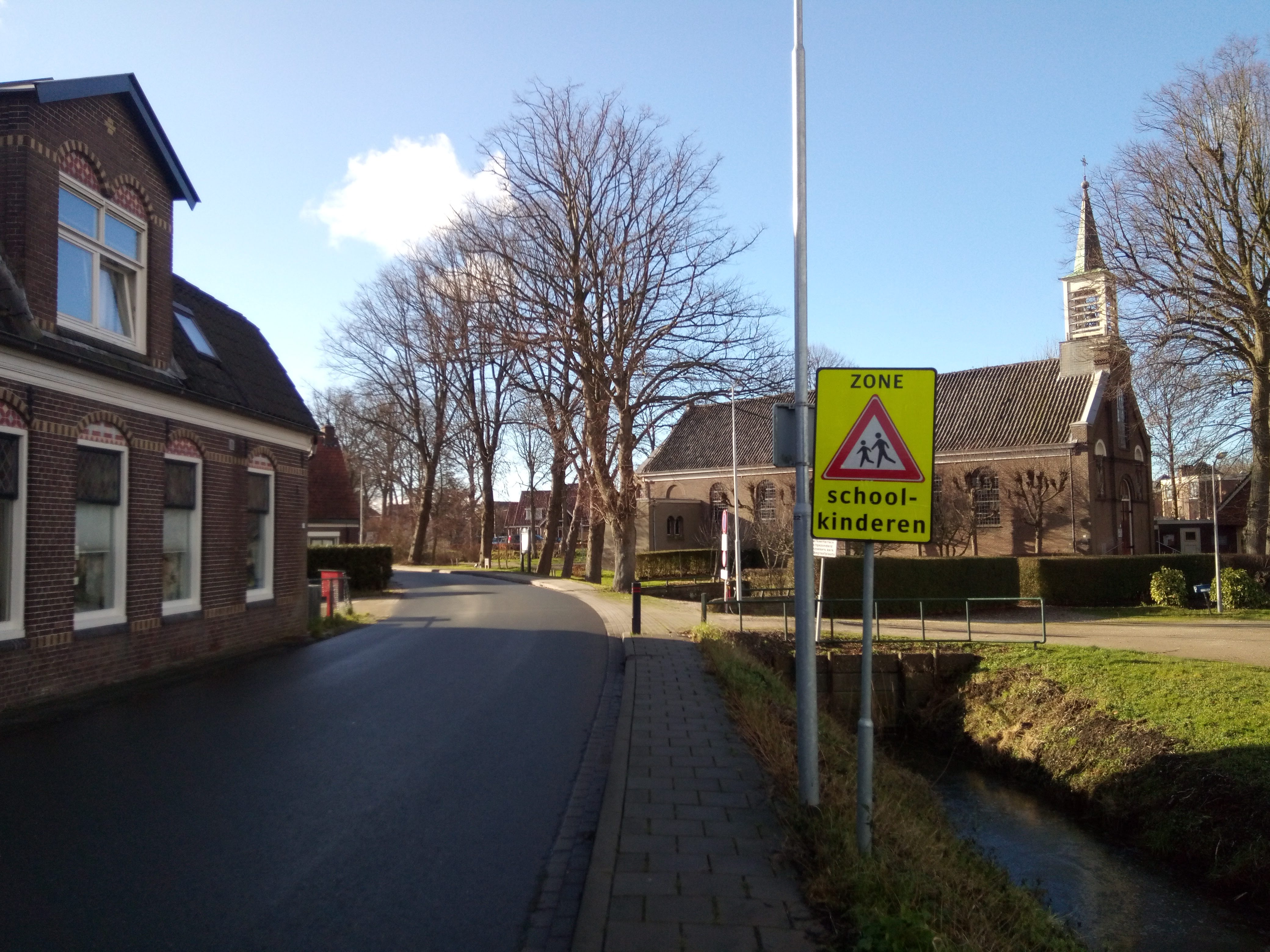 Haarlemmerliede